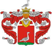 Το οικόσημο του οίκου των Ραέφσκι